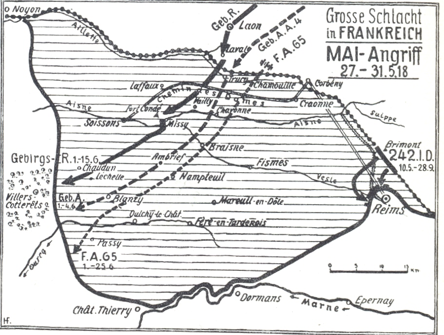 Karte: Mai-Angriff 1918